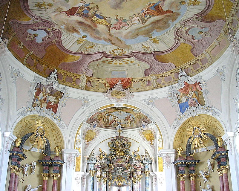 Wallfahrtskirche zu Unserer Lieben Frau (Bobingen, Landkreis Augsburg, Bayerisch-Schwaben). Blick ins Gewölbe. Eigene Aufnahme, Okt. 2007 / Pilgrimage church of Our Lady (Bobingen near Augsburg, Bavaria, Germany). Interior, looking up into the vault. Own photo, Oct. 2007